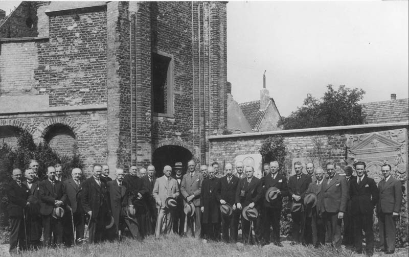 Excursie van de Maastrichtse afdeling van het L.G.O.G. naar het kruisherenklooster van Sint-Agatha in Cuyk in 1934. Fotocollectie RHCL Maastricht, GAM 10518.